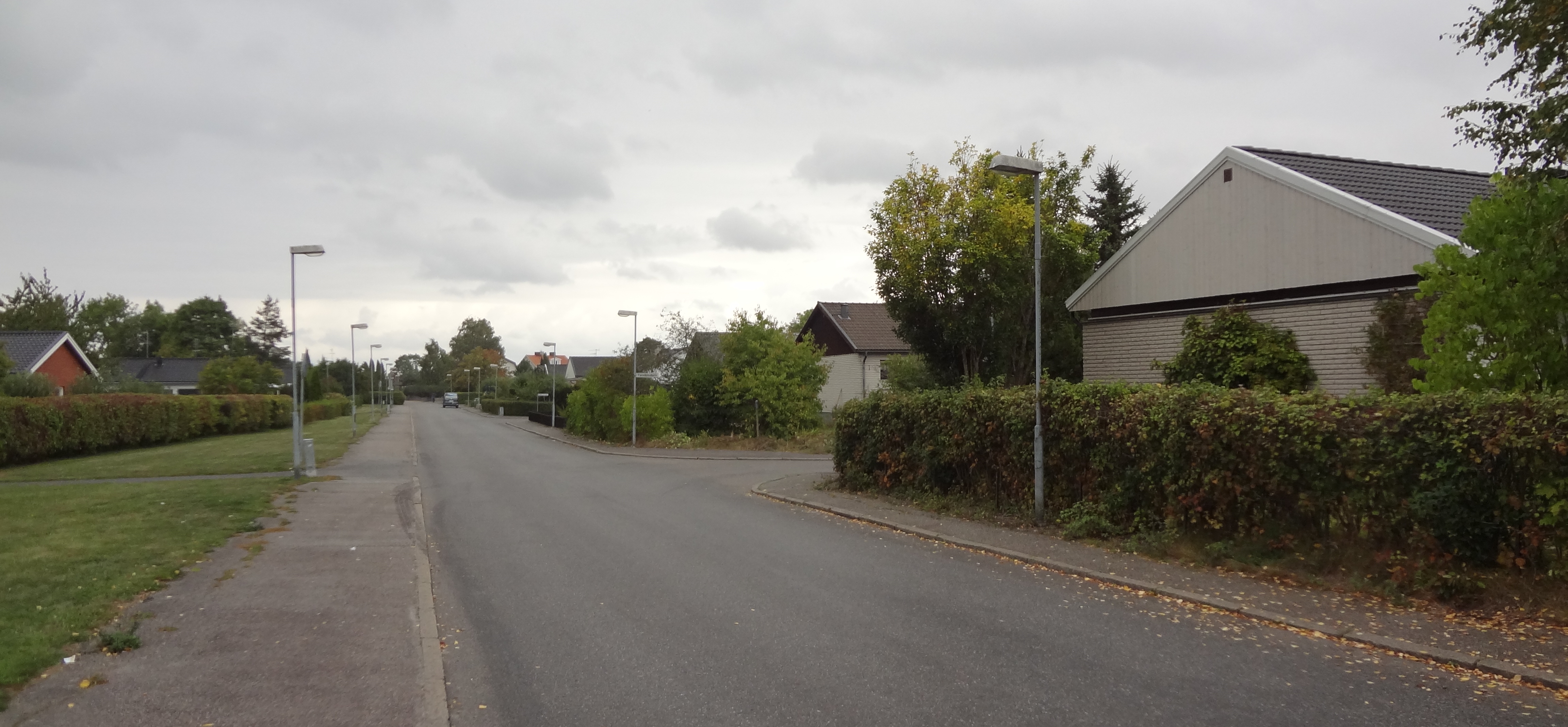 Stadsdelen Brottsta i Eskilstuna. Gatan Stensättarvägen, till höger går Tunnbindarvägen in.